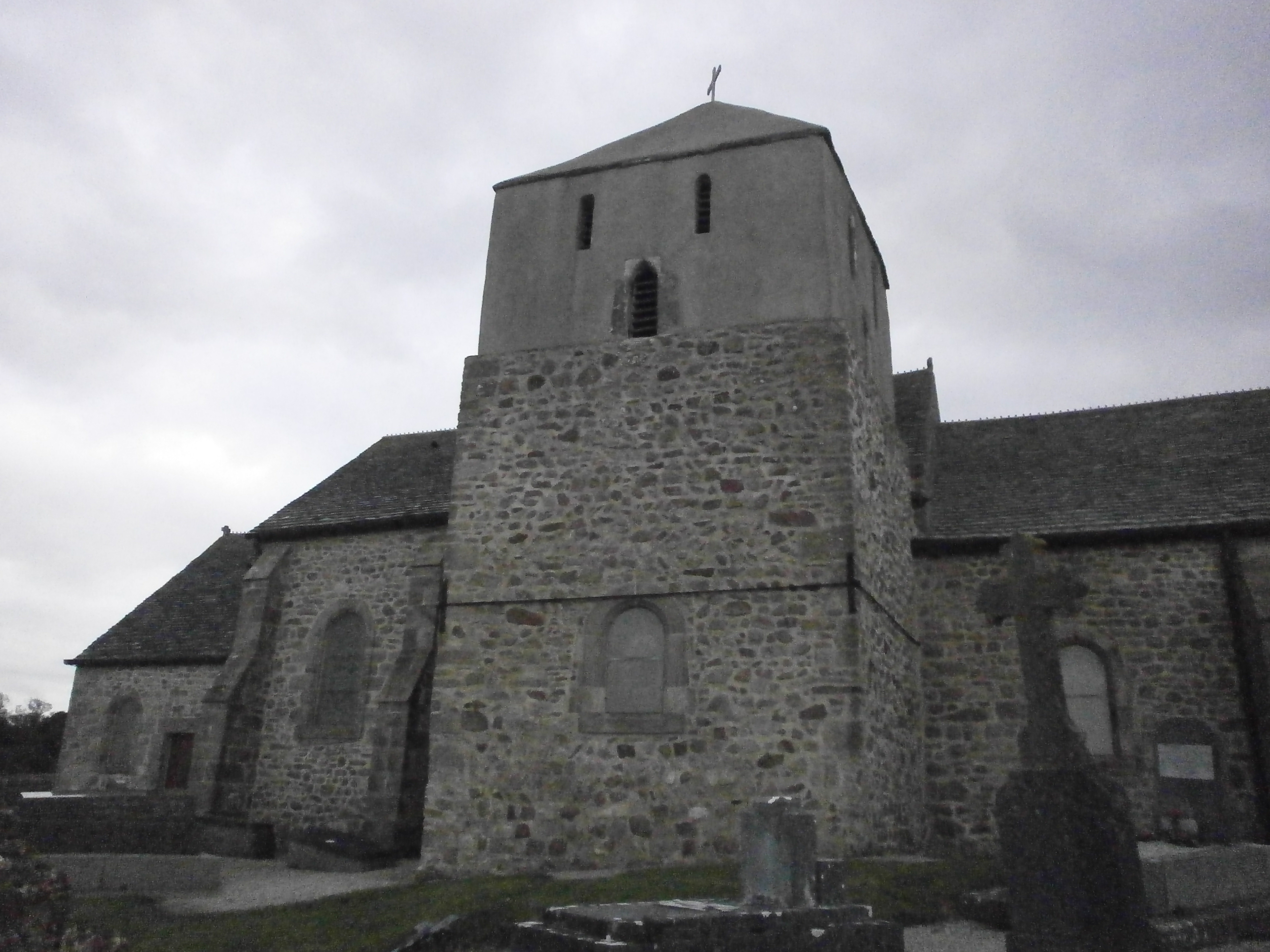 Tour-clocher de l'église Saint-Paterne - Digulleville